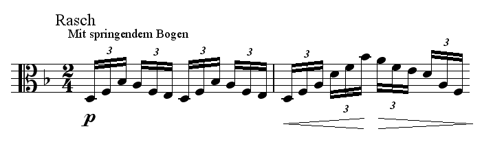 Les premières mesures de la partie d'alto de la troisième pièce des Märchenbilder pour alto & piano de Robert Schumann